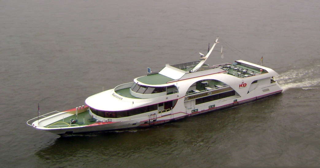 Die MS Warsteiner auf dem Rhein in Düsseldorf